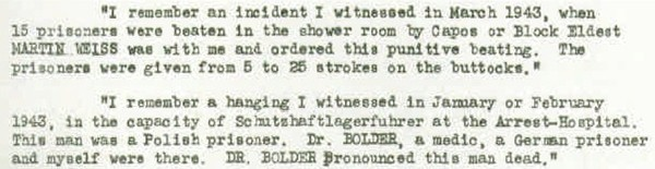 Ausschnitt aus der Zusammenfassung einer Aussage von Arno Lippmann im Vorfeld des Dachauer Prozesses